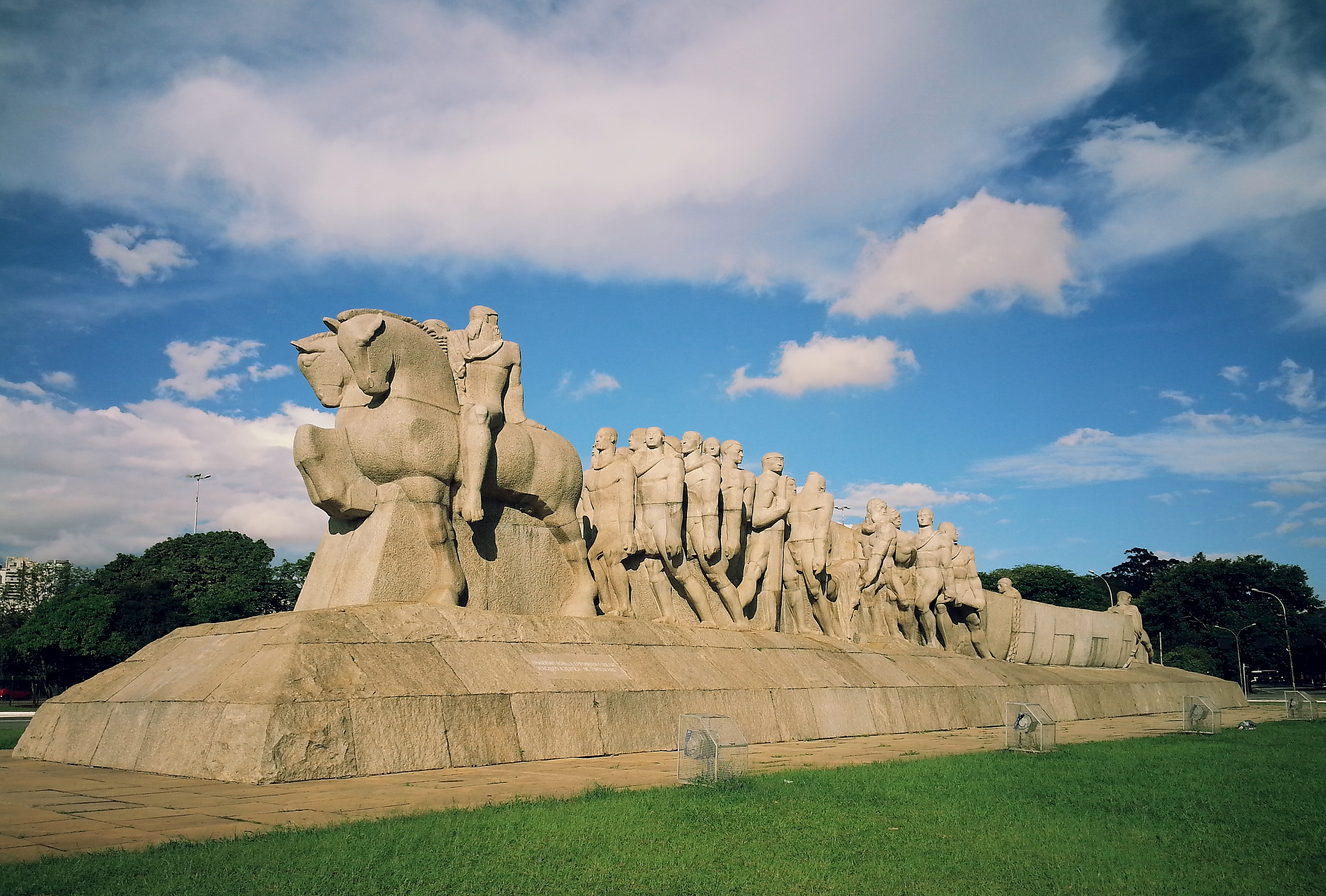 MONUMENTO ÀS BANDEIRAS